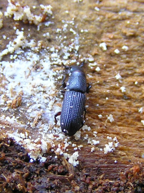 Hylastes ater, Zakorek czarny, Polska